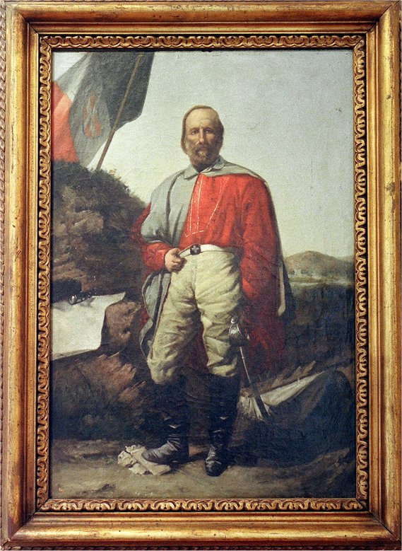 1860, Ritratto di Giuseppe Garibaldi per Francesco Paolo Palizzi conservato al Museo centrale del risorgimento di Roma (Vittoriano)